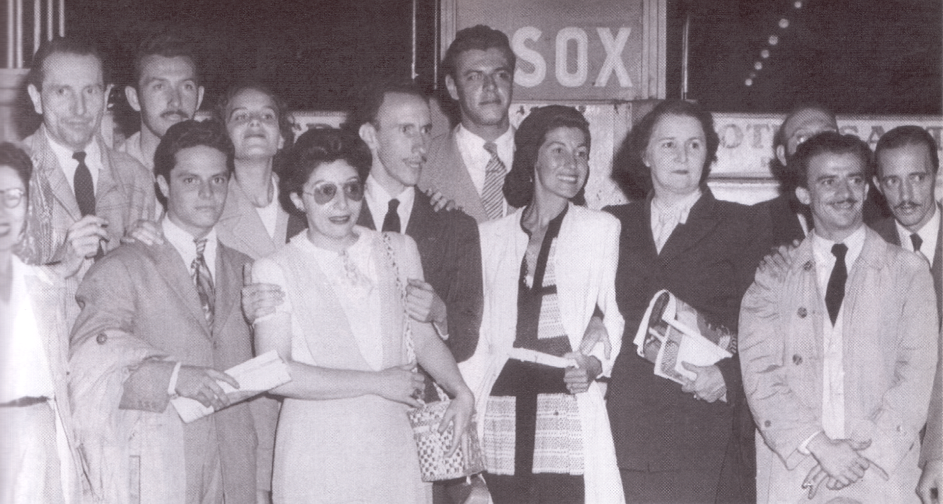 Os V Comediantes desembarcando na Estação Roosevelt; São Paulo, SP, 24 de fevereiro de 1947. Atrás: Zbigniew Ziembinski, Tito Lívio Fleury Martins, Virgínia Vanni, Miroel Silveira e Orlando Guy. À frente: Nieta Junqueira, Josef Guerreiro, Iara Izabel, Cacilda Becker, Alzira Becker (mãe de Cacilda), Jackson de Souza e Olinto Marconi.